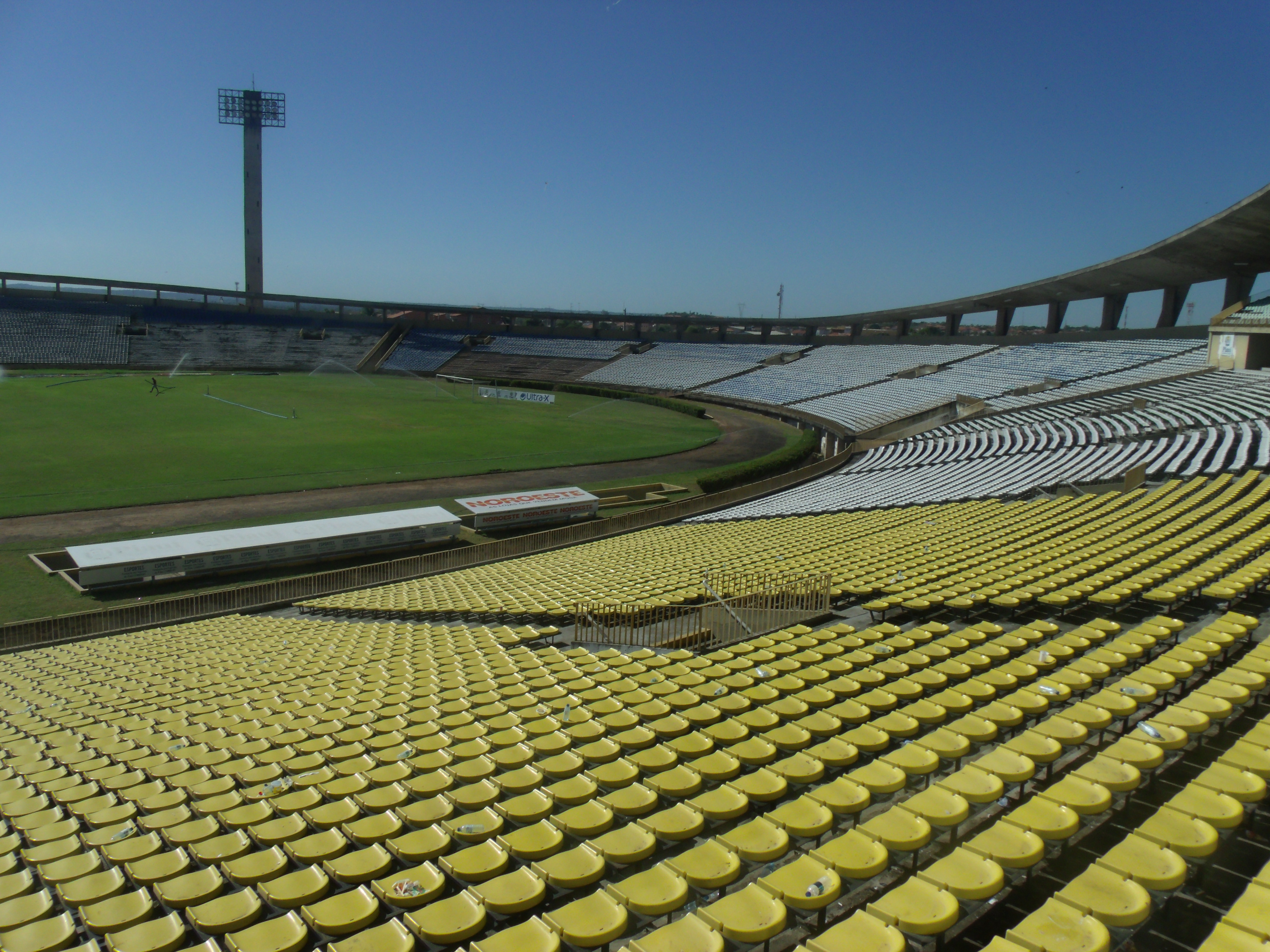 Vista interior do estádio Albertão de Teresina.